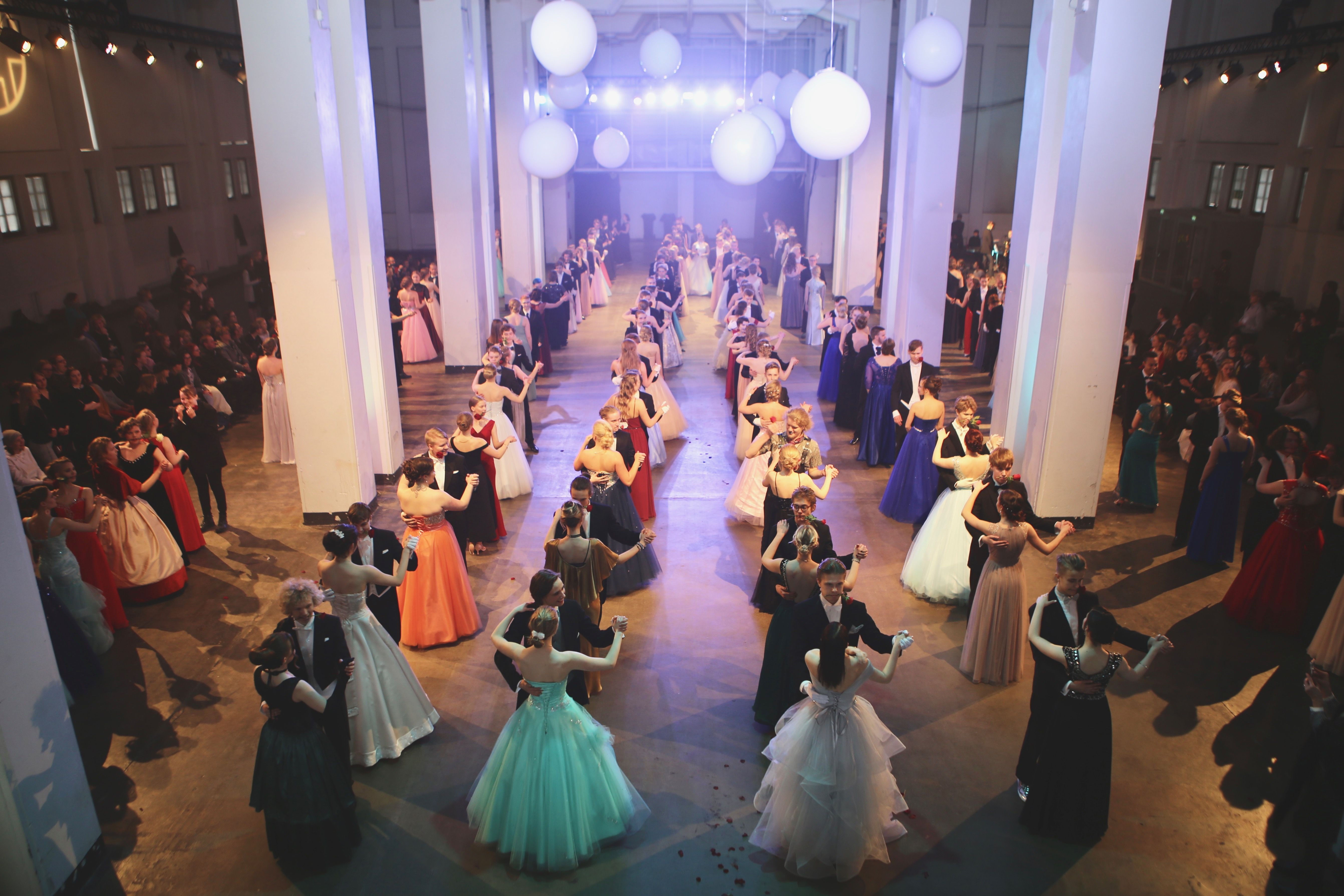 Kallion lukion vanhojen tanssit Helsingin Kattilahallissa 17. helmikuuta 2017.